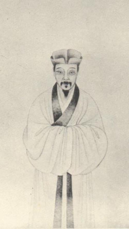 朱用纯，清朝学者。Zhu Yongchun